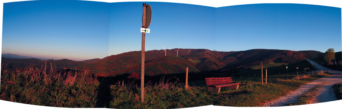 Holzschlägermatte bei Freiburg/Schauinsland - Aufnahmestandort Parkplatz oberhalb Eckhof, Fotograf Richard Schindler